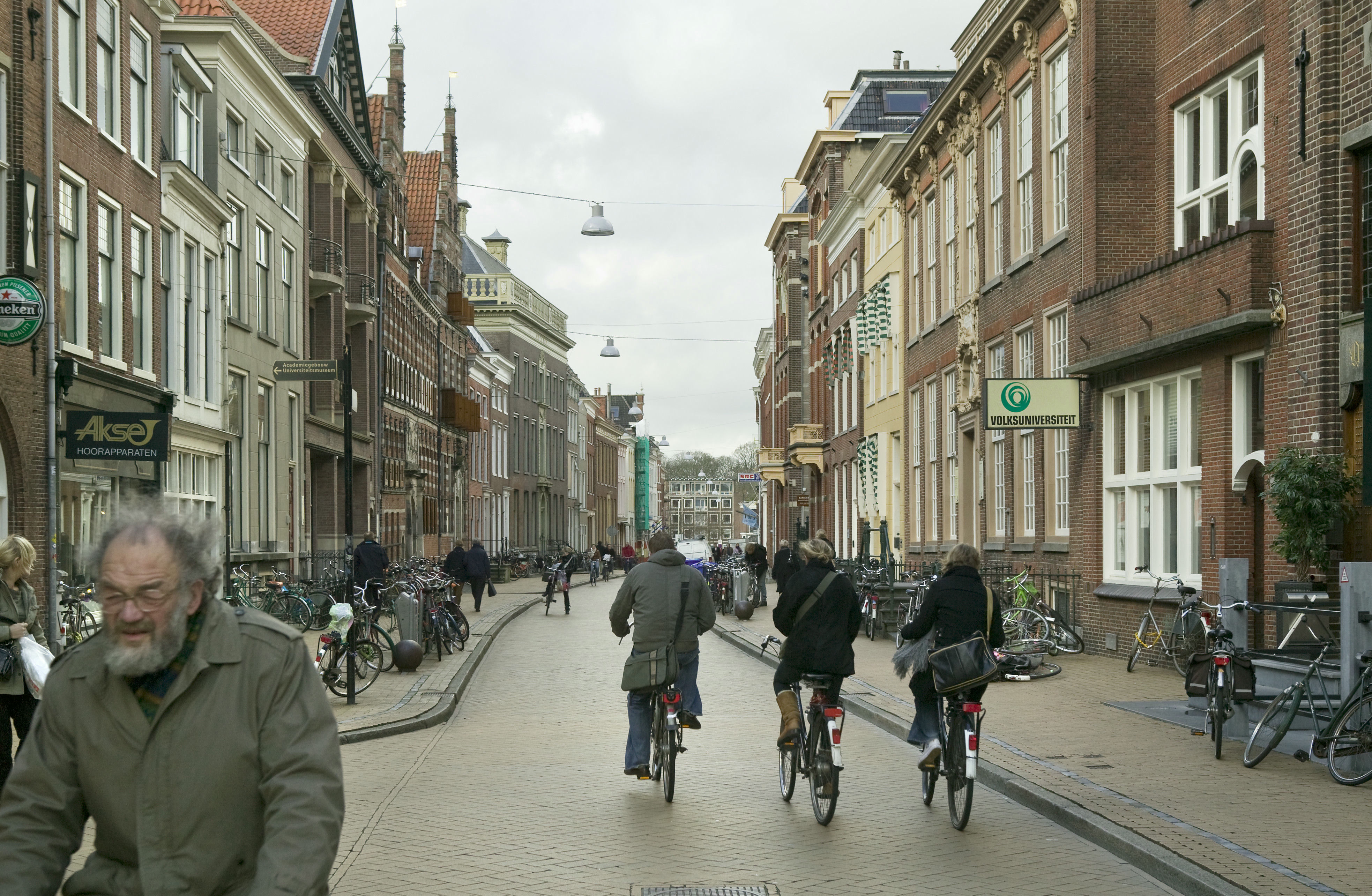 Beschermd stadsgezicht: Overzicht straat, onderdeel van het beschermd stadsgezicht